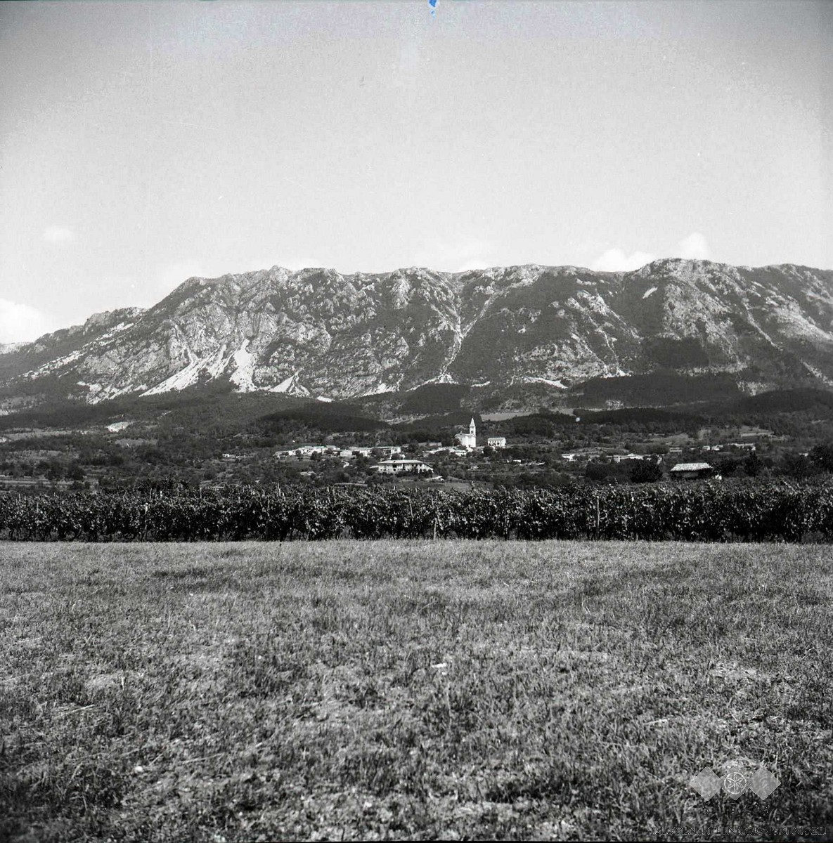 Pogled na Budanje, nad njimi hrib Kouk.